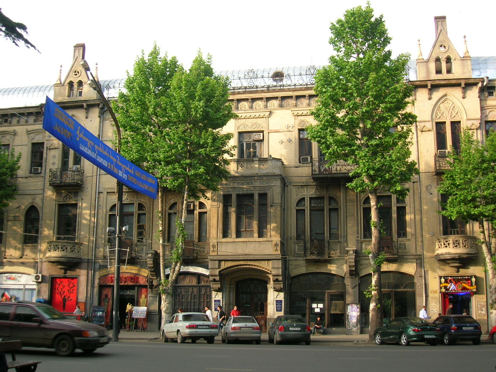 Staatliches Georgisches Institut für Theater und Film, Rustaweli-Boulevard, Tiflis, Georgien